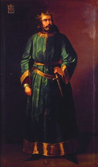 Retrato imaginario del rey Pedro I de Aragón († 1104), que fue hijo del rey Sancho Ramirez de Aragón y de la reina Isabel de Urgel.